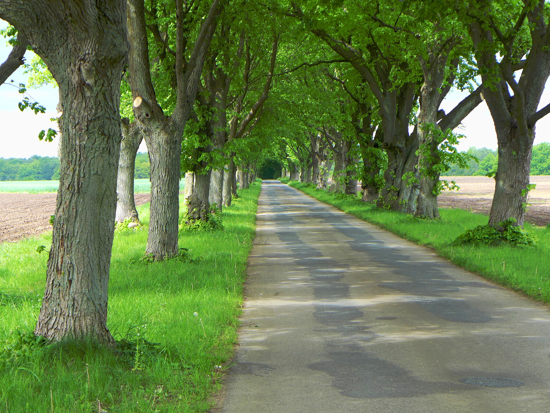 Allee im Frühling bei Timmerloh, einem Ortsteil von Deimern und Soltau.